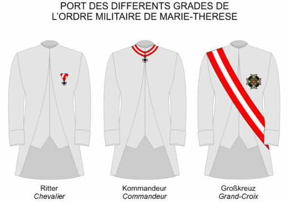 Port des différents grades de l'Ordre de Marie-Thérèse